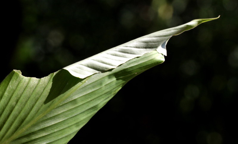 GRASS DEMON Udaspes folus larva cell